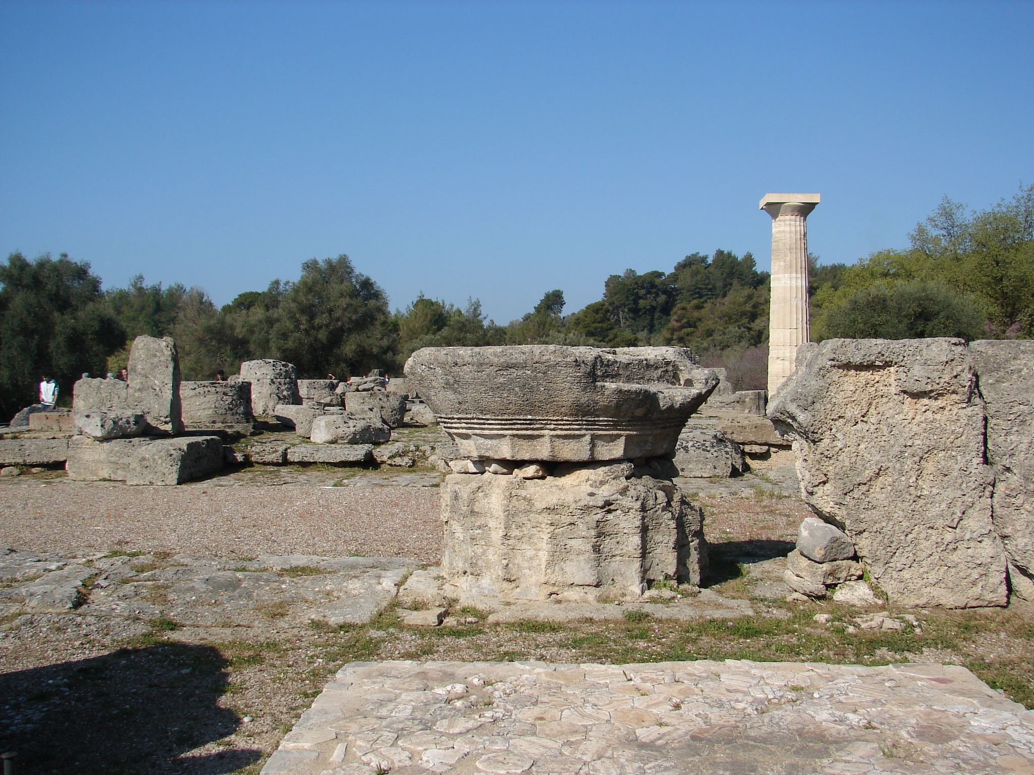 Tempio di Zeus Olimpia April 2006